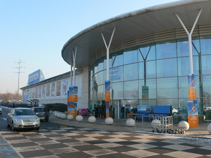 Brétigny-sur-Orge (Essonne, Île-de-France, France) : Magasin Decathlon.